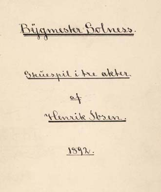 Рукопись пьесы "строитель Сольнес"